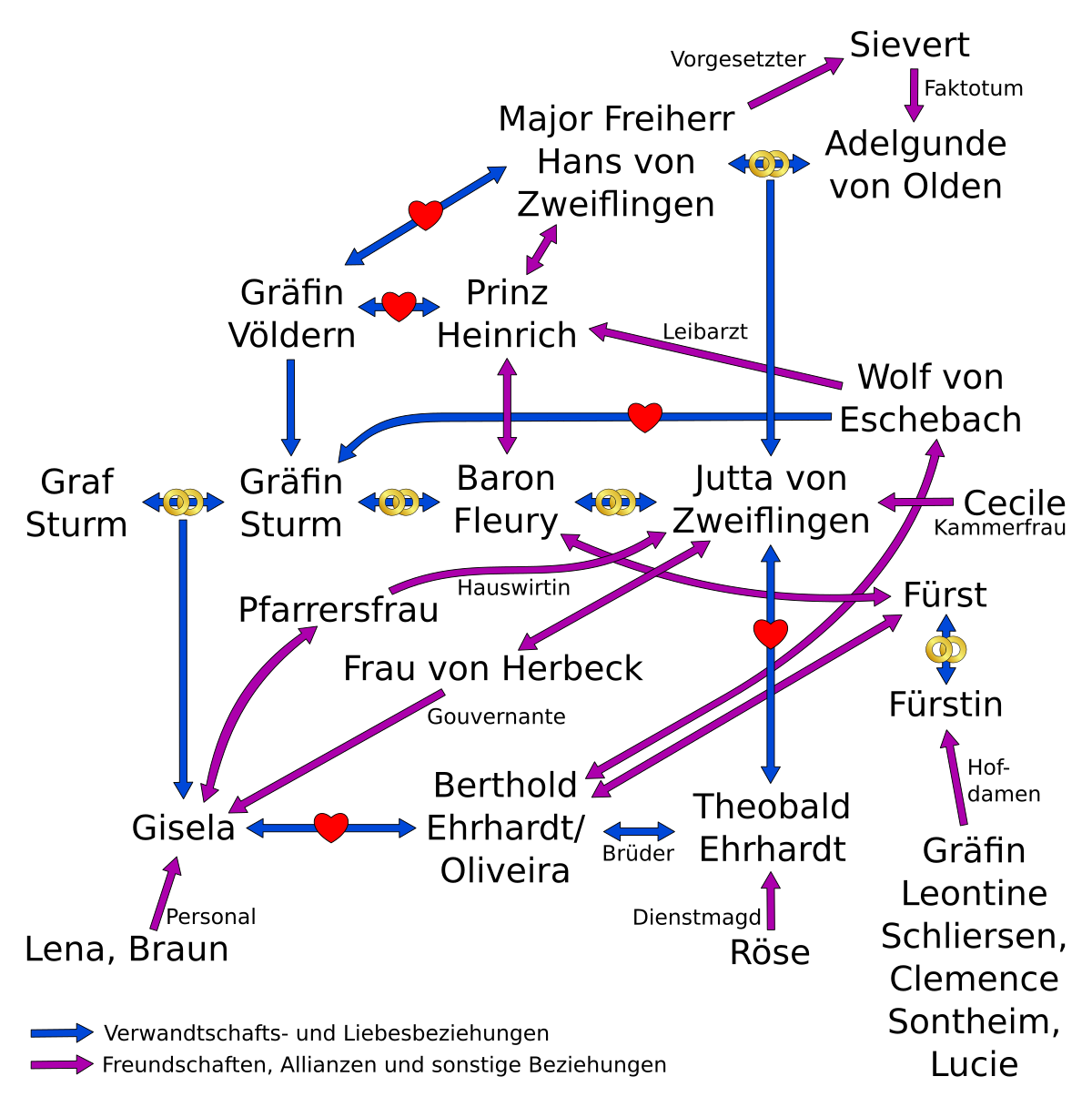 Figurenbeziehungen in E. Marlitts Roman "Reichsgräfin Gisela" (Deutschland, 1869)